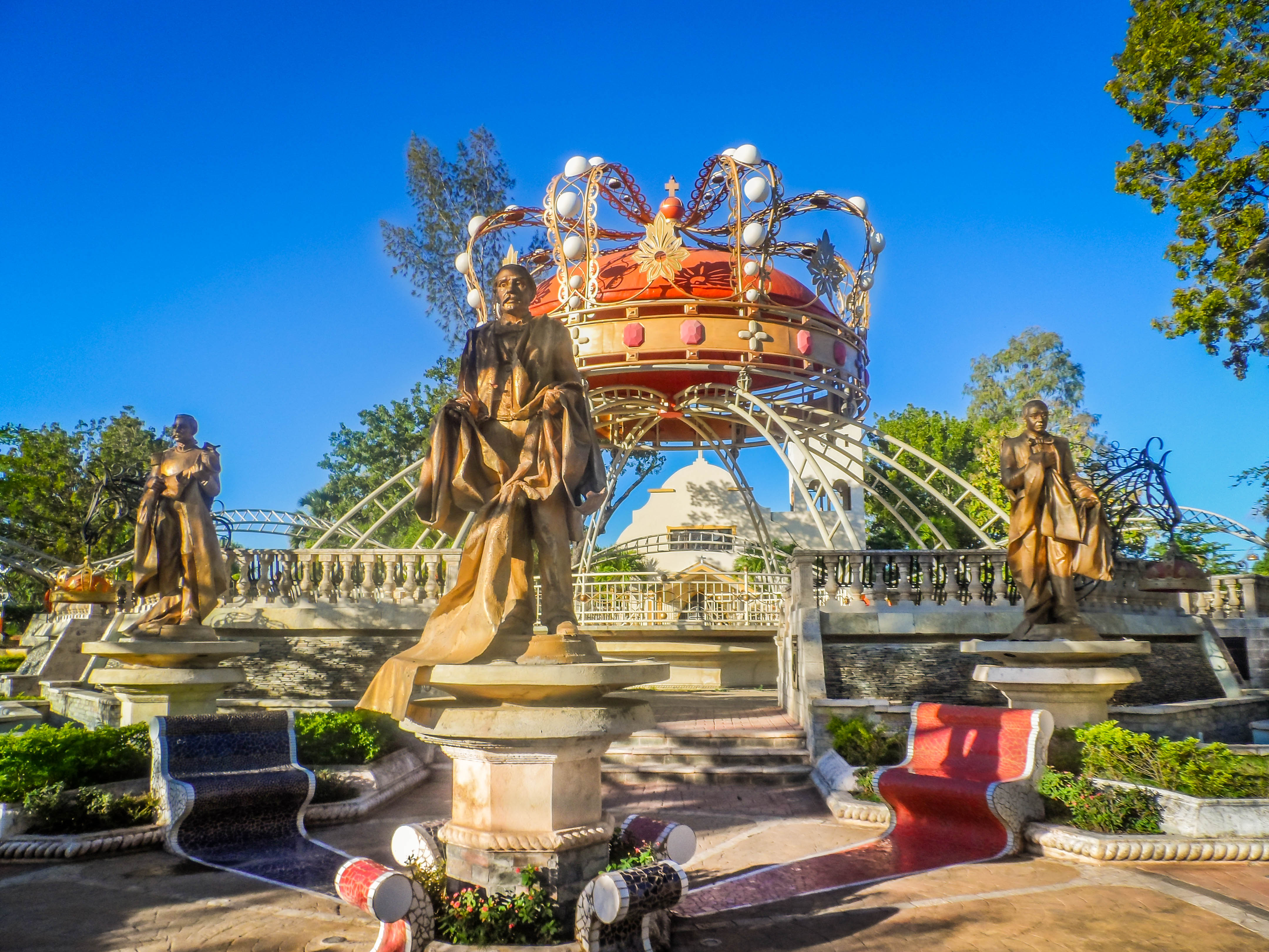 Parque Mercedes de la Rocha, Hato Mayor del Rey. En la imagen se encuentran las estatuas de Juan Pablo Duarte, Francisco del Rosario Sanchez y Matias Ramon Mella, Padres de la Patria Dominicana. Al fondo se encuentra la Parroquia Nuestra Senora de Las Mercedes.